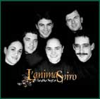 A Banchieri Énekegyüttes 2002-es CD lemeze